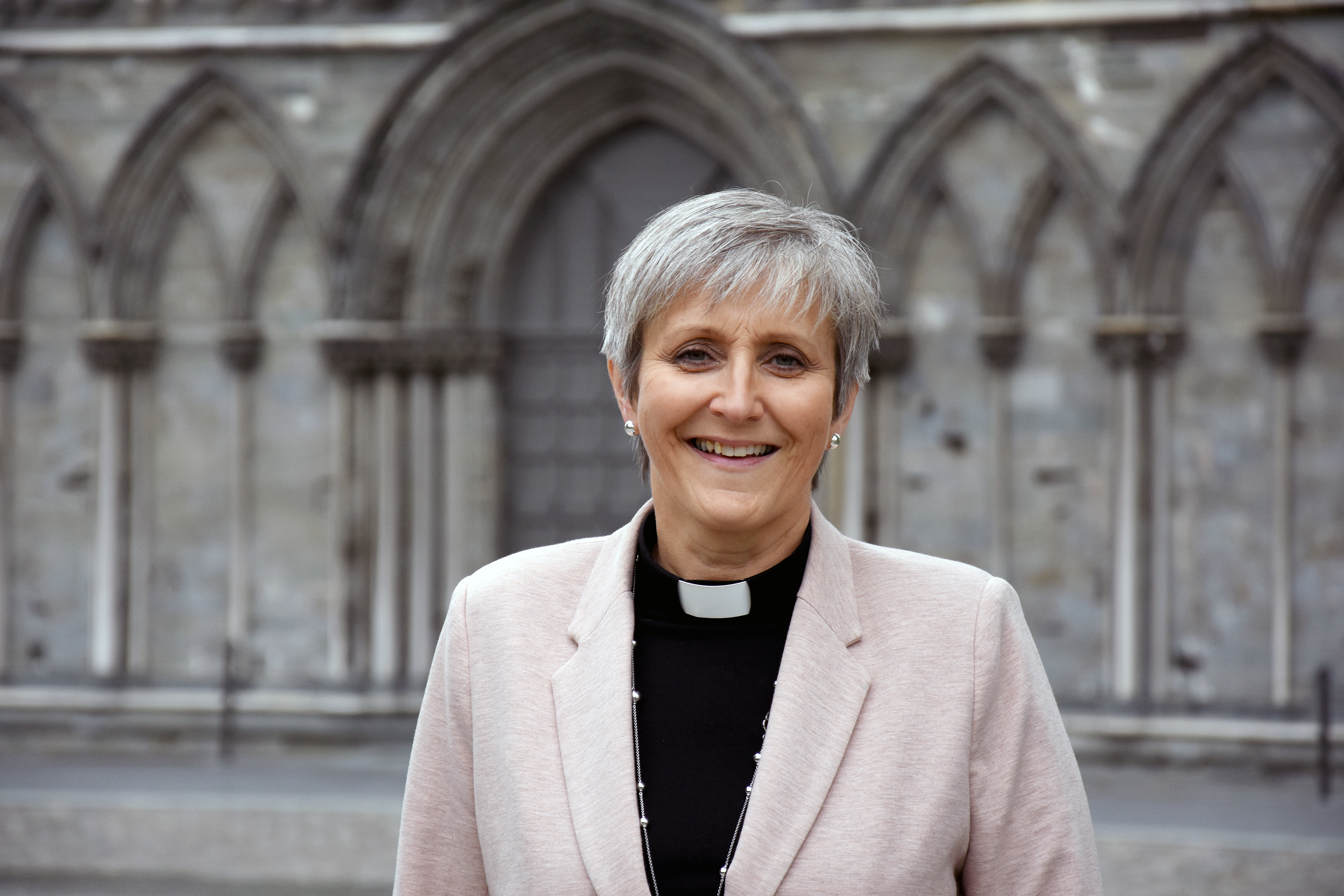 Biskopen i Nidaros, Herborg Finnset, fotografert utenfor Nidarosdomen i 2017